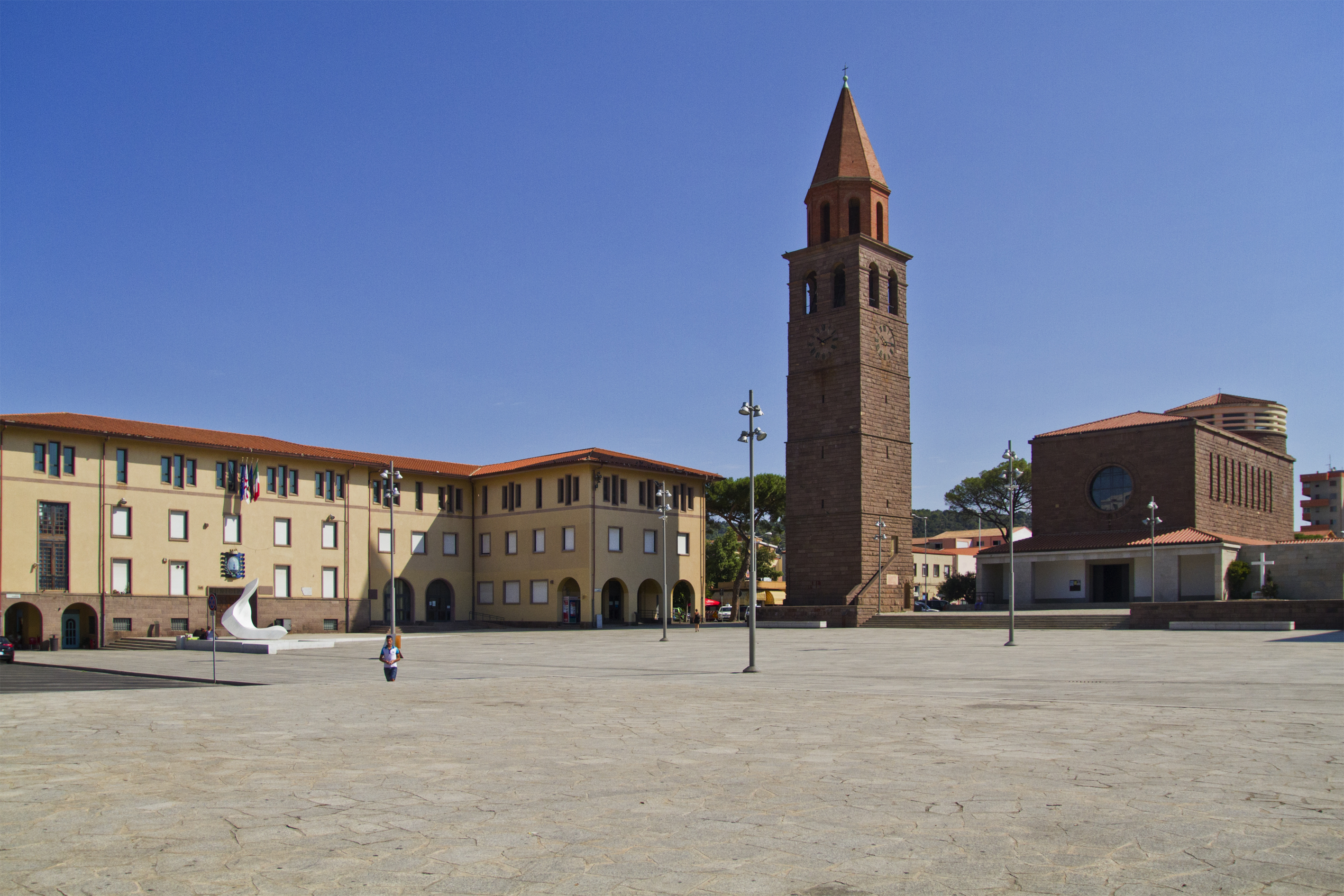 Carbonia - Piazza Roma